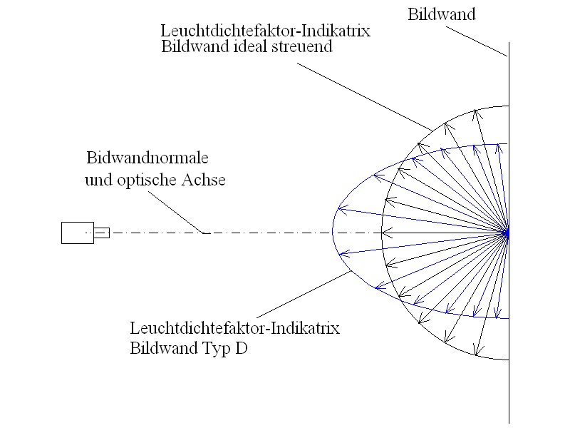 Leuchtdichtefaktor-Indikatrix, Vergleich: Bildwand ideal streuend, reale Bildwand Typ D, diffus reflektierend.